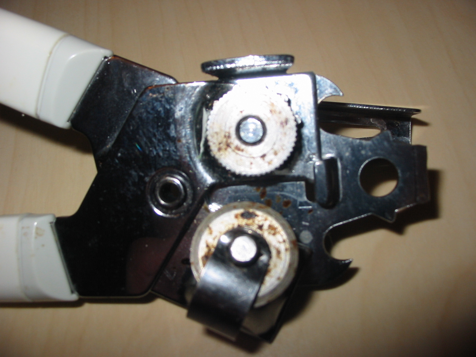 Abrelatas, detalle can openere detail